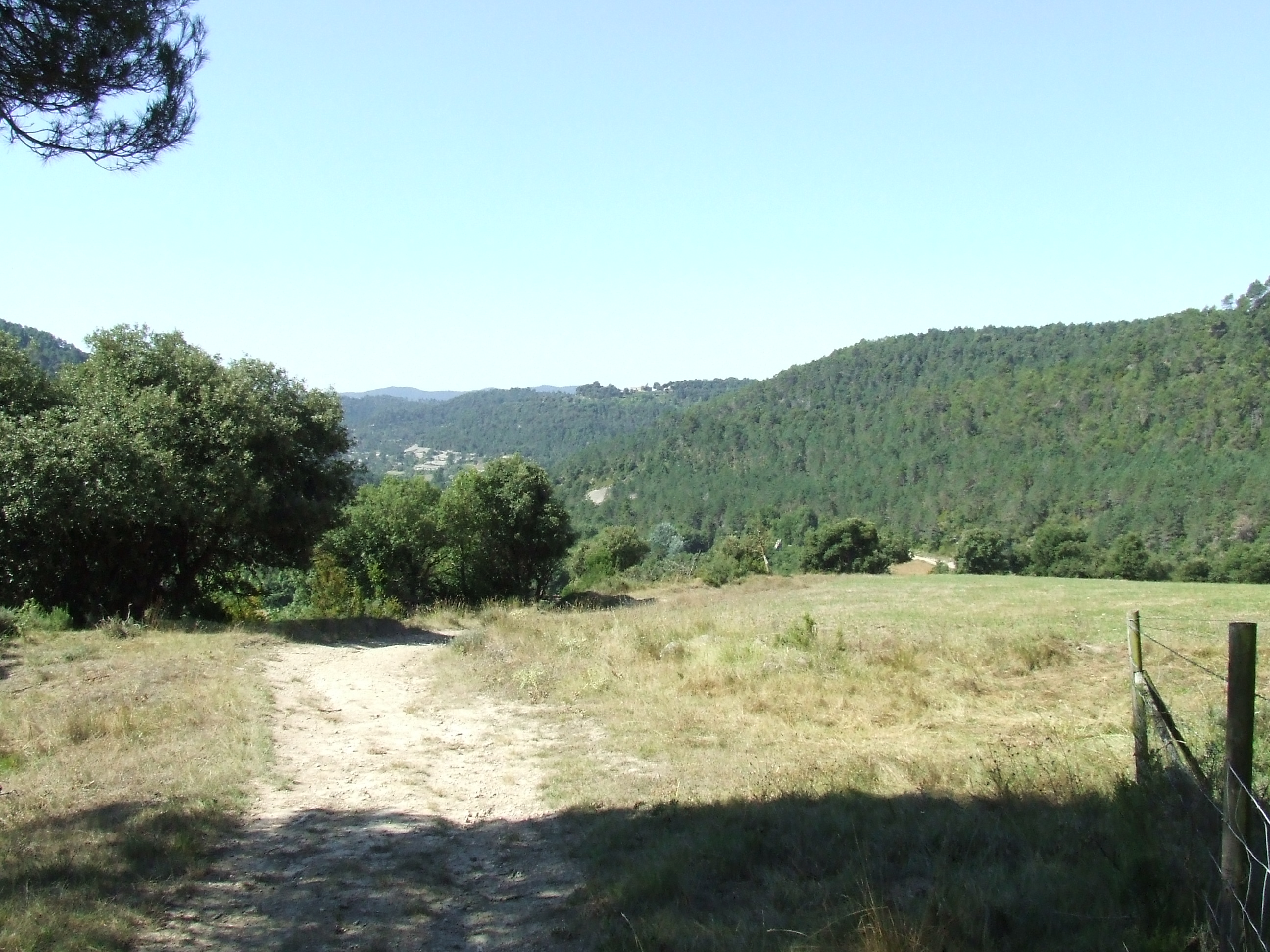 El Camí de Centelles, al Pla Fesoler (Castellcir, Moianès)